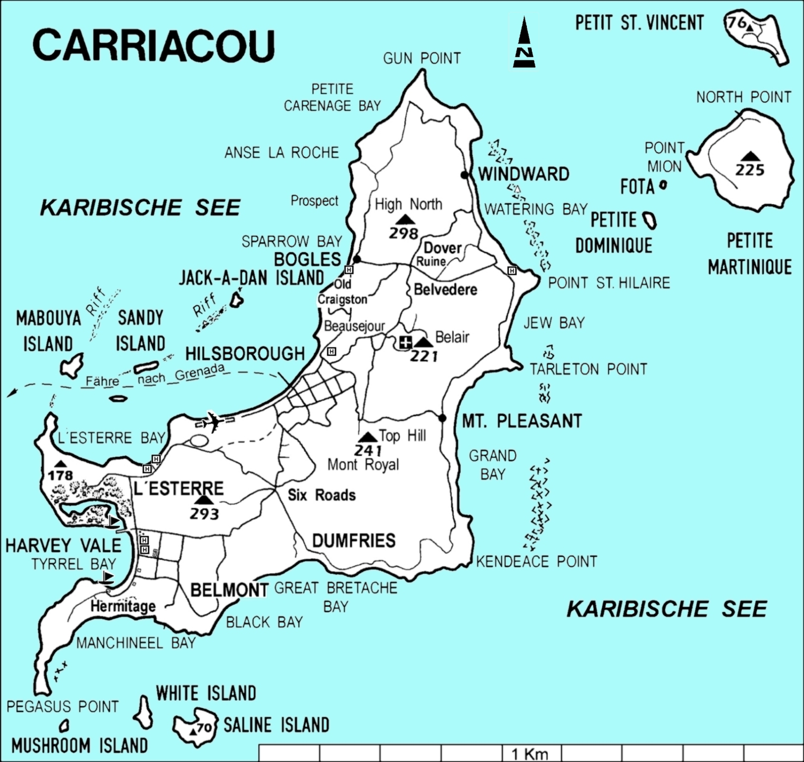 Karte von Carriacou